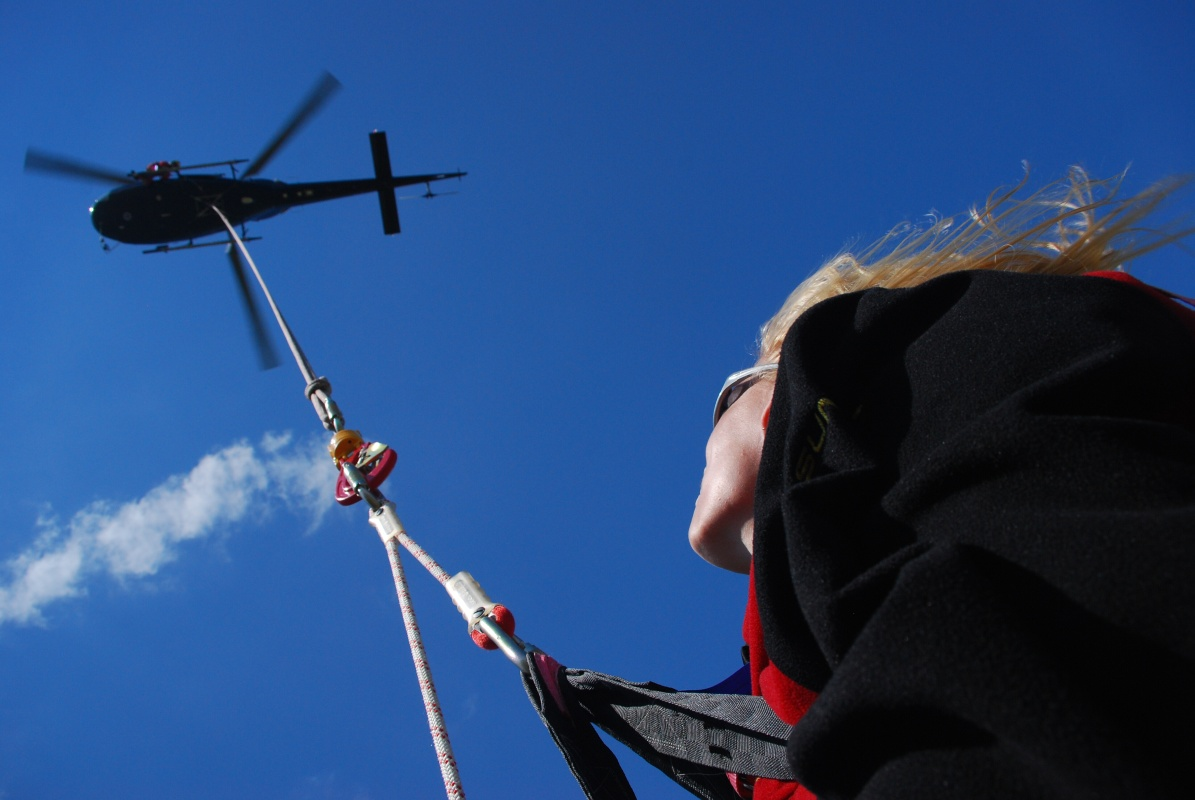 Záchranná akcia